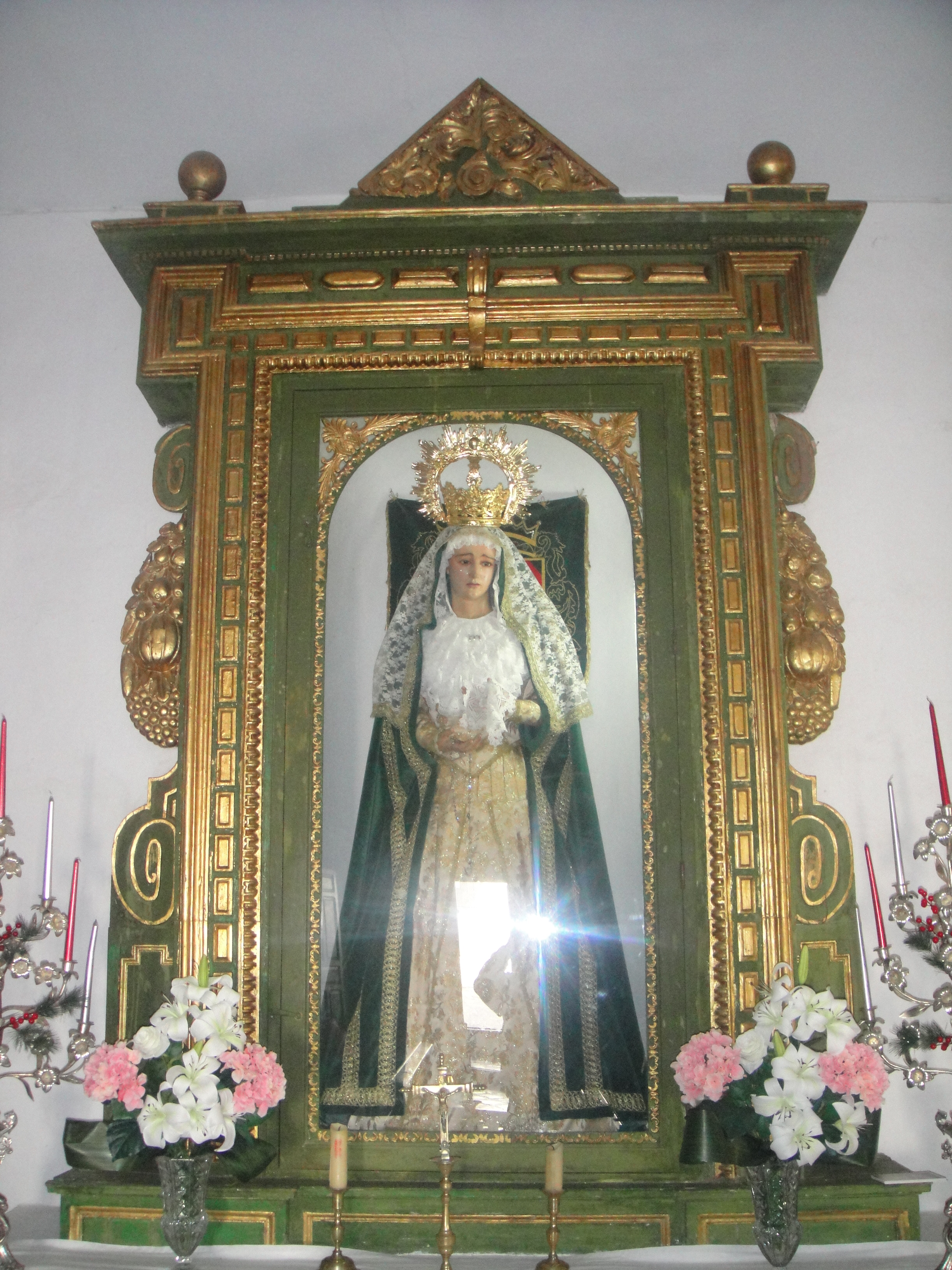 Nuestra Señora de la Esperanza. Ermita de Jesús Nazareno de Fuente Obejuna, provincia de Córdoba, (España).